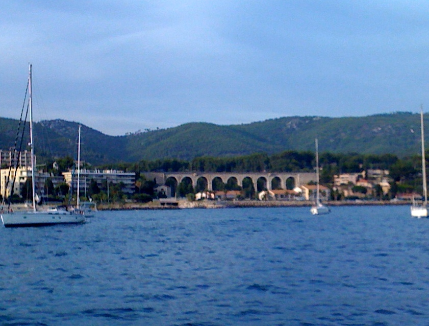 Viaduc de Bandol, dans le Var (France), vu depuis la baie de Bandol.